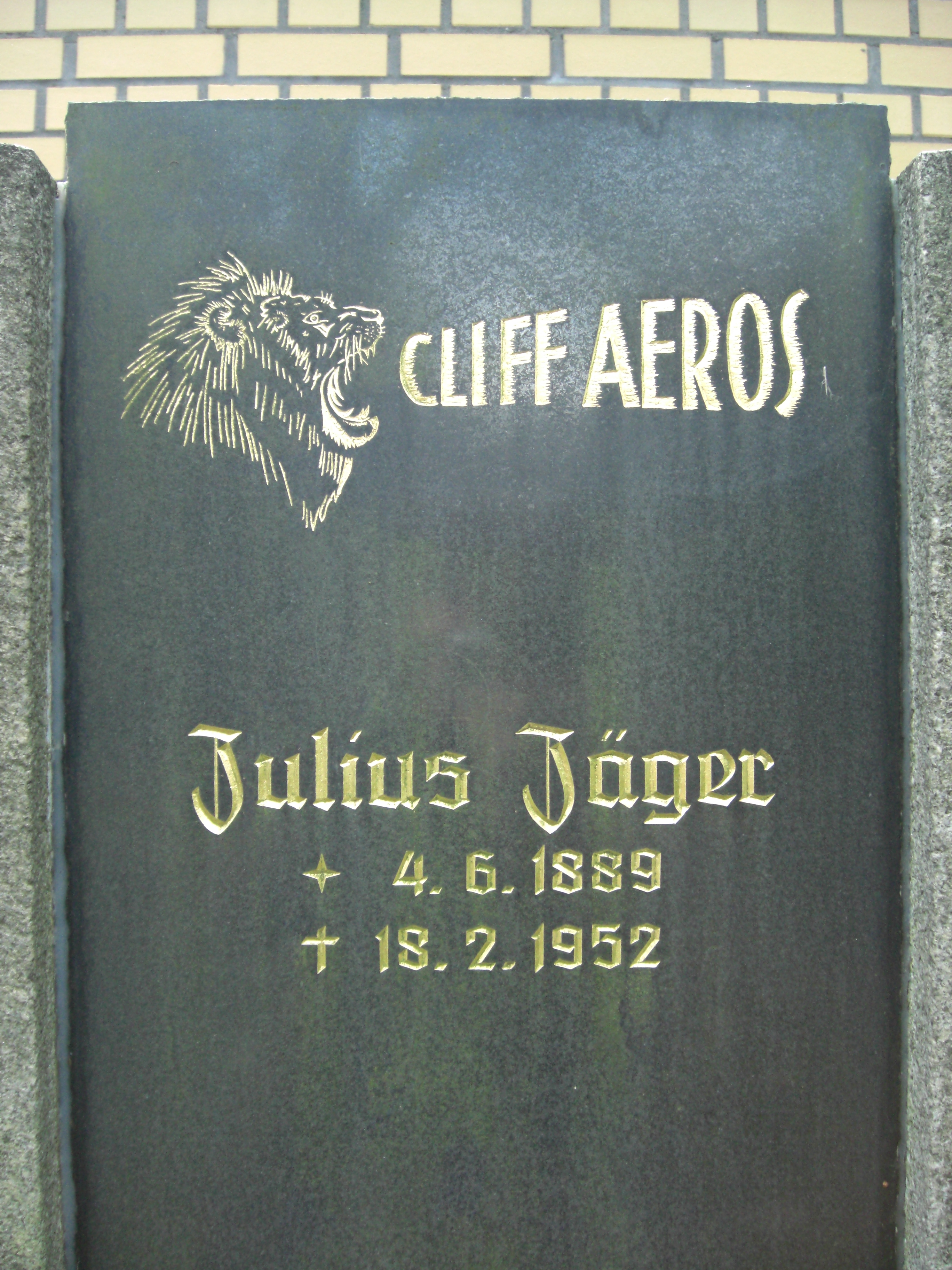 Cliff Aeros (1889-1952), Zirkusunternehmer und Artist; Leipzig, Südfriedhof